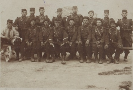 360éme regiment 1914-18